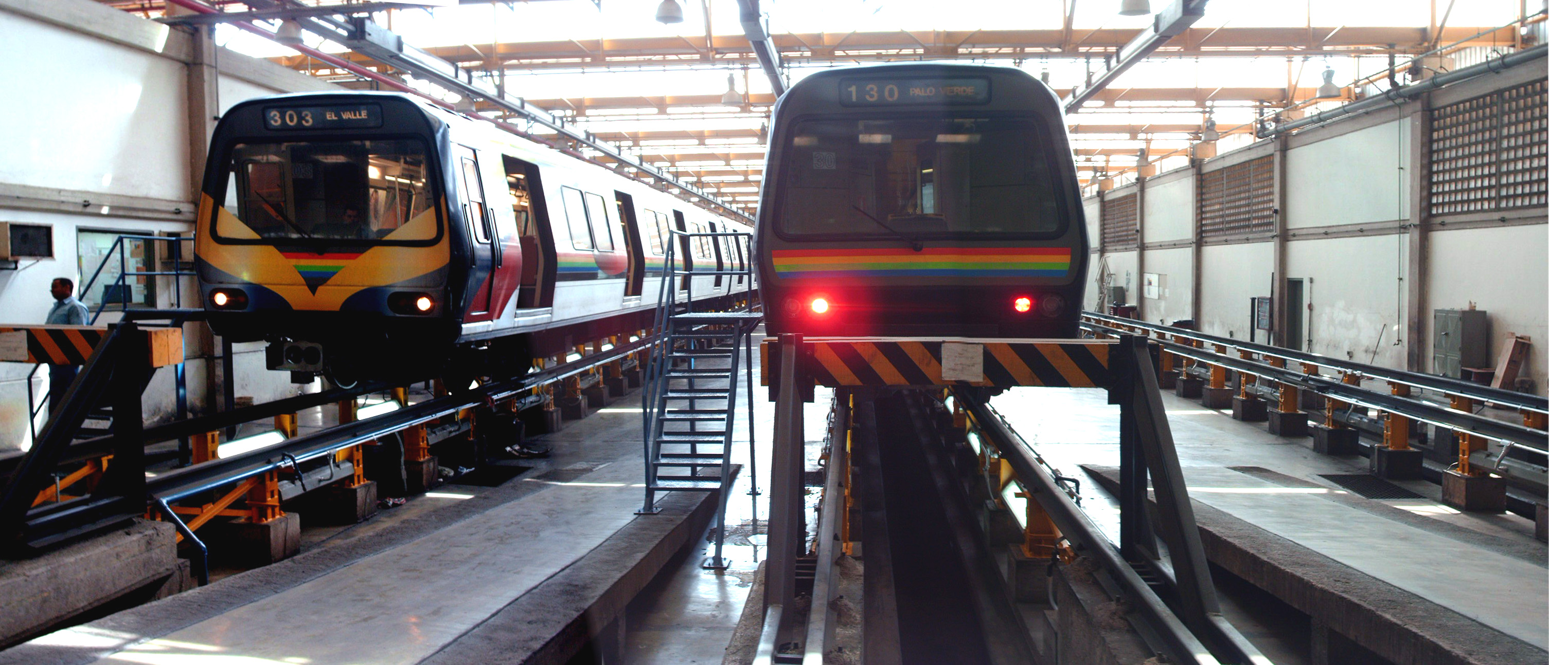 Simulación de operación, Patios y Talleres Propatria